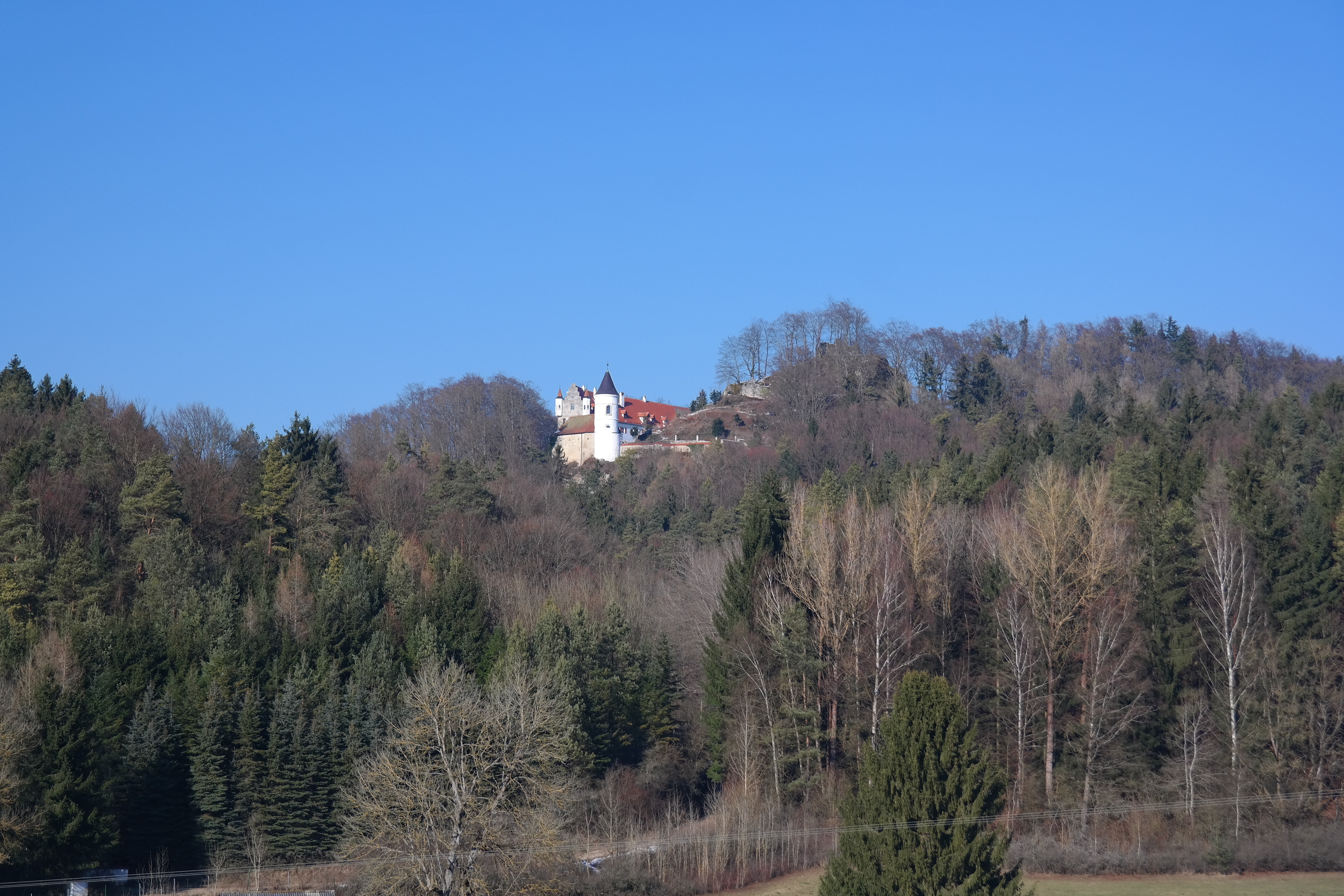 Schloss und Burgruine Neidenstein - Ansicht von Süden